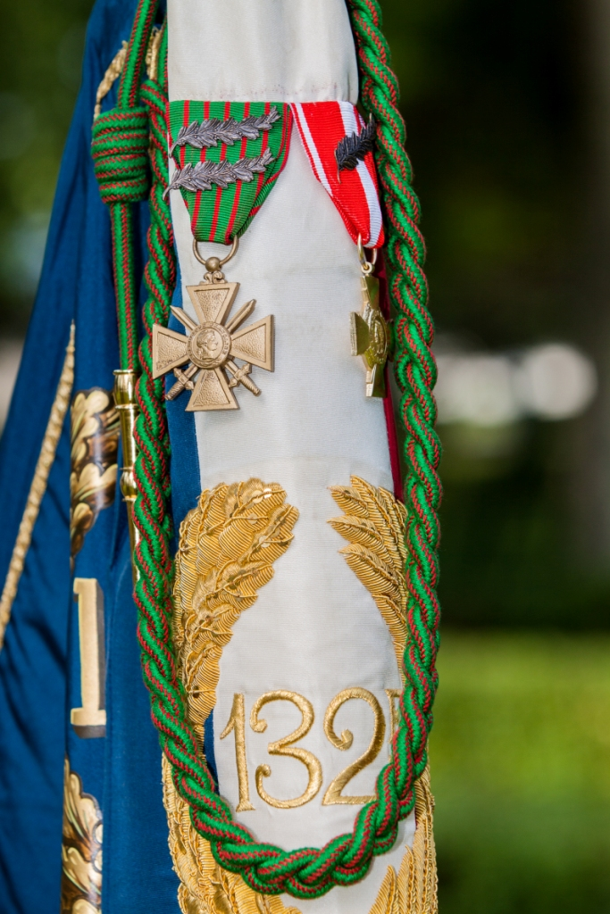 cravate du drapeau du 132e RI, décorée de la fourragère aux couleurs du ruban de la croix de guerre 1914-1918, de la croix de guerre 1914-1918 avec deux palmes et de la croix de la valeur militaire avec une palme